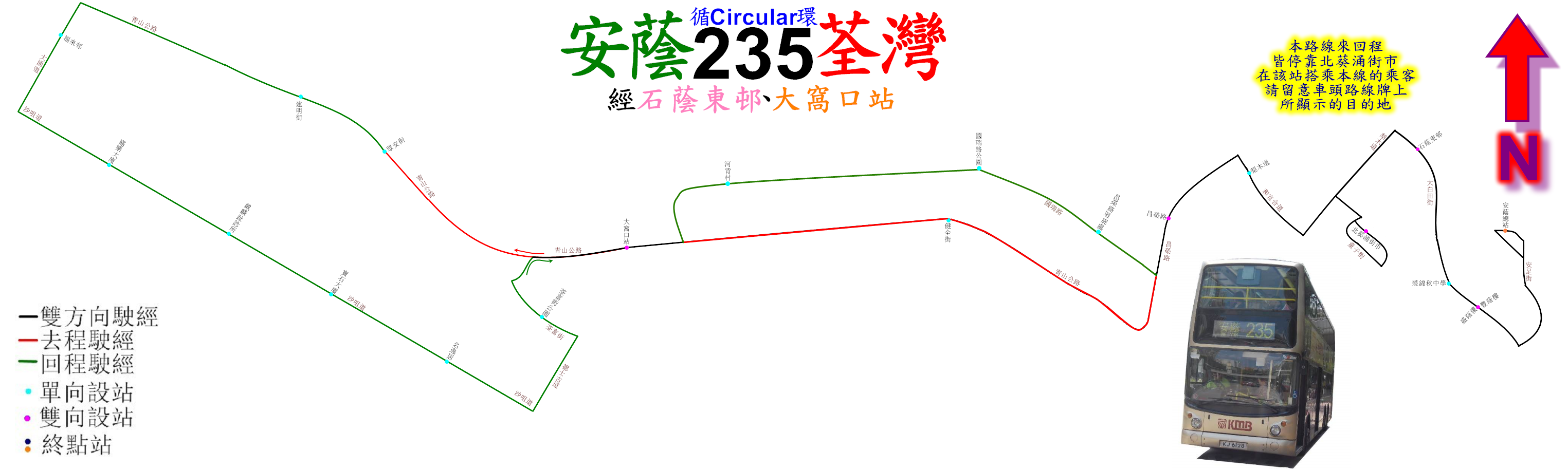 中文（香港）: 九龍巴士235線的走線圖中文（台灣）: 九巴235路公車的走線圖